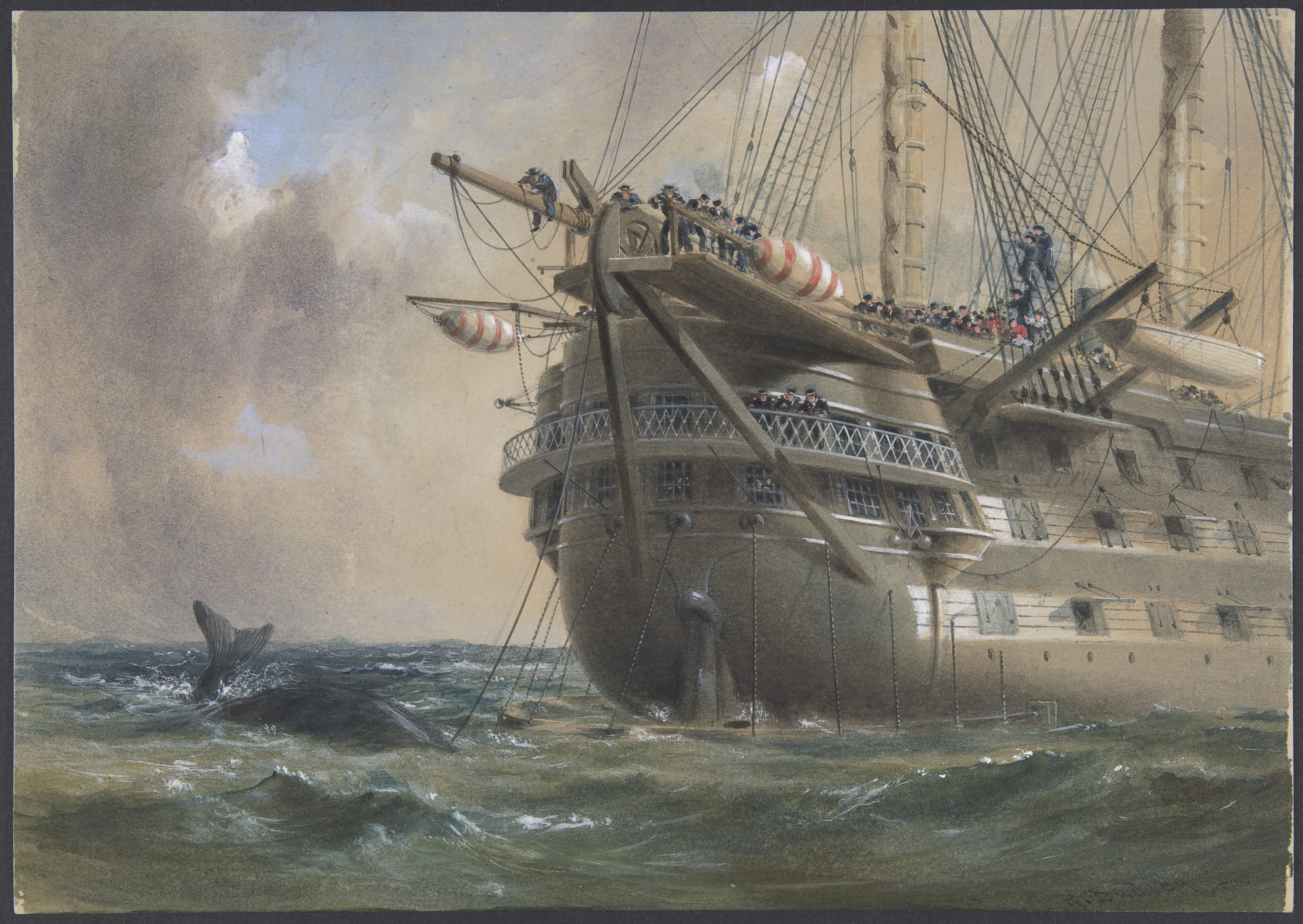 Drawing; Drawings